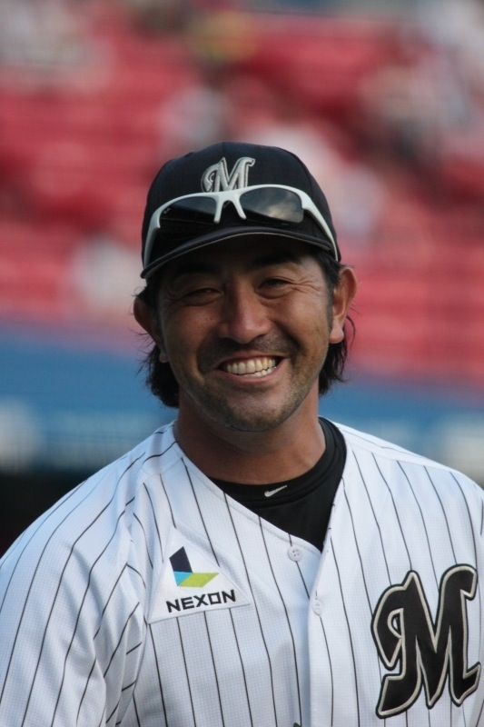 日本プロ野球 千葉ロッテマリーンズ GG佐藤選手